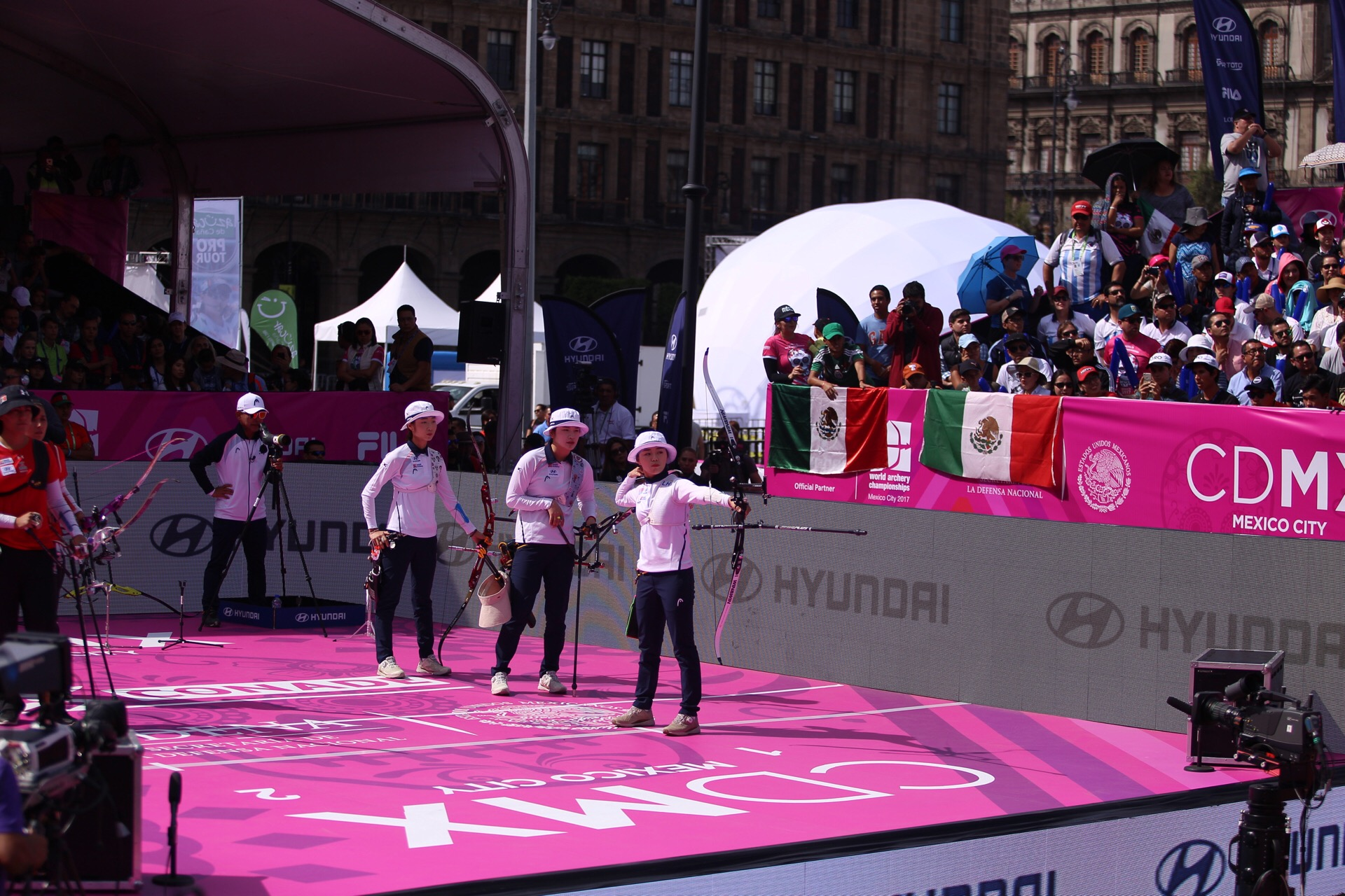 Campeonato de Tiro con Arco en el Zócalo de la Ciudad de México 2017